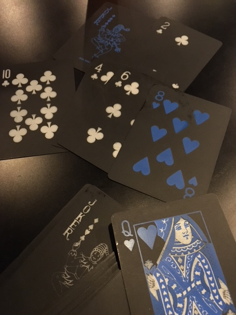 フィフティーン中のトランプ